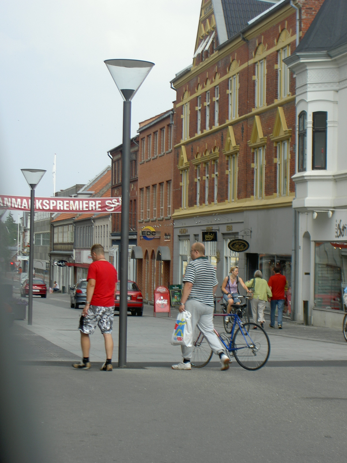 Et stykke af Odder gågade.